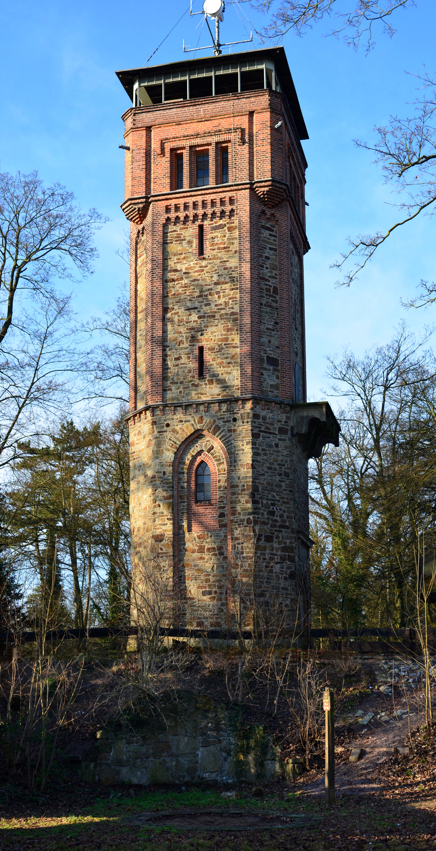 Klütturm